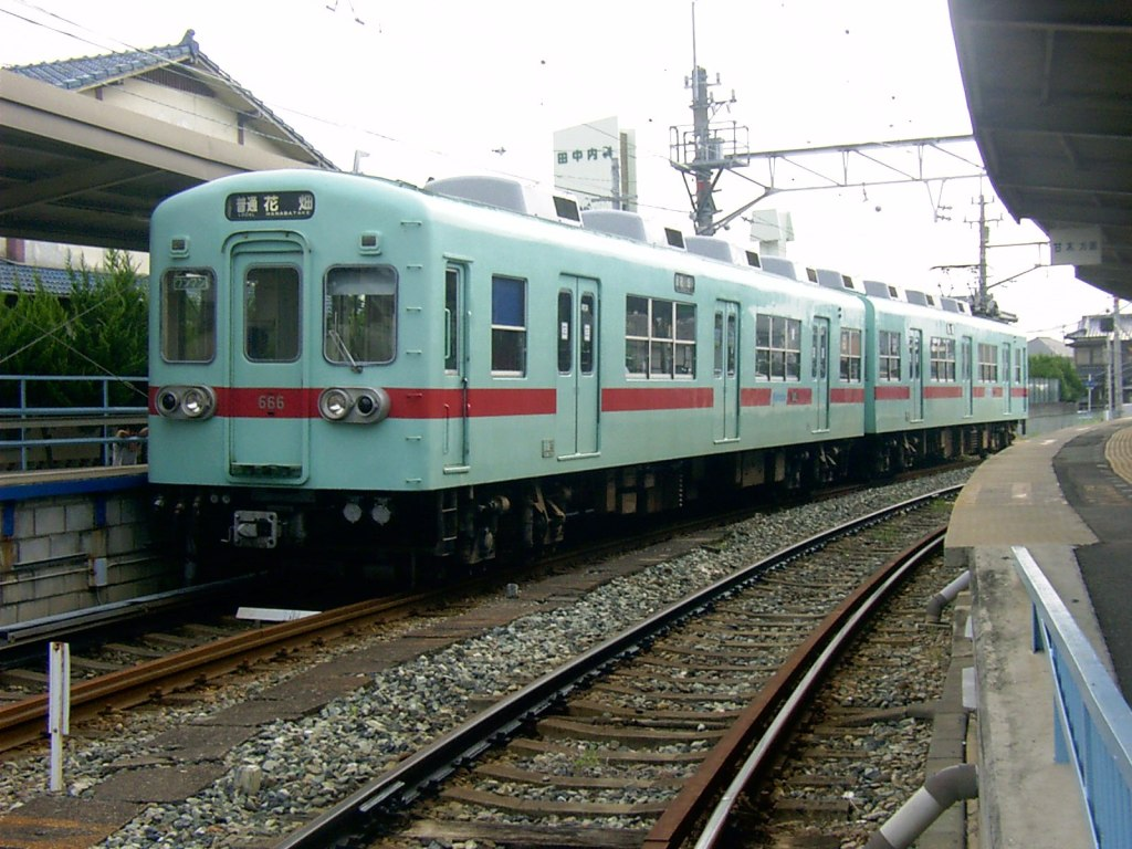 西鉄甘木線北野駅に停車中の600形電車